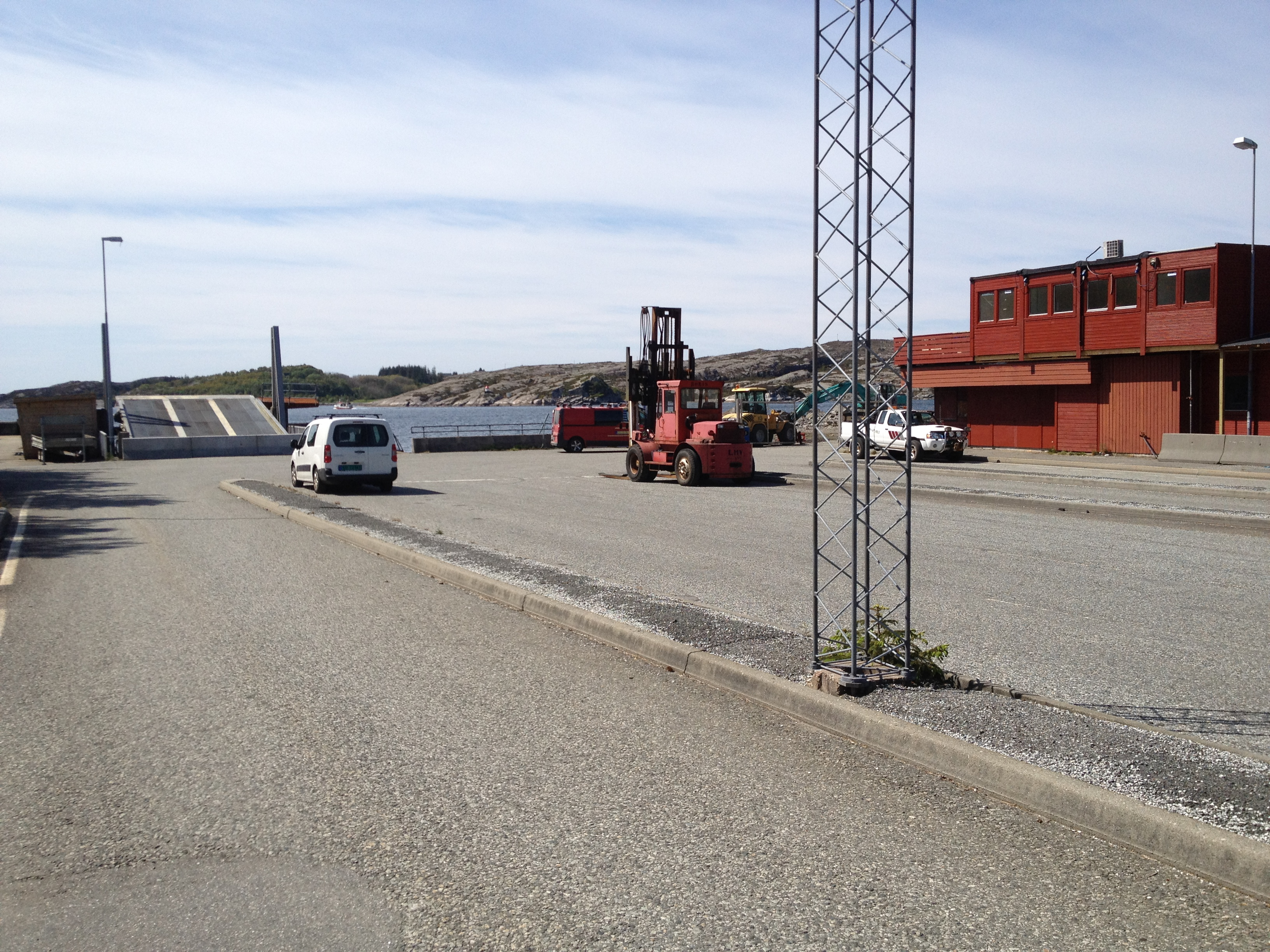 Austefjorden ferjekai i Sund kommune.